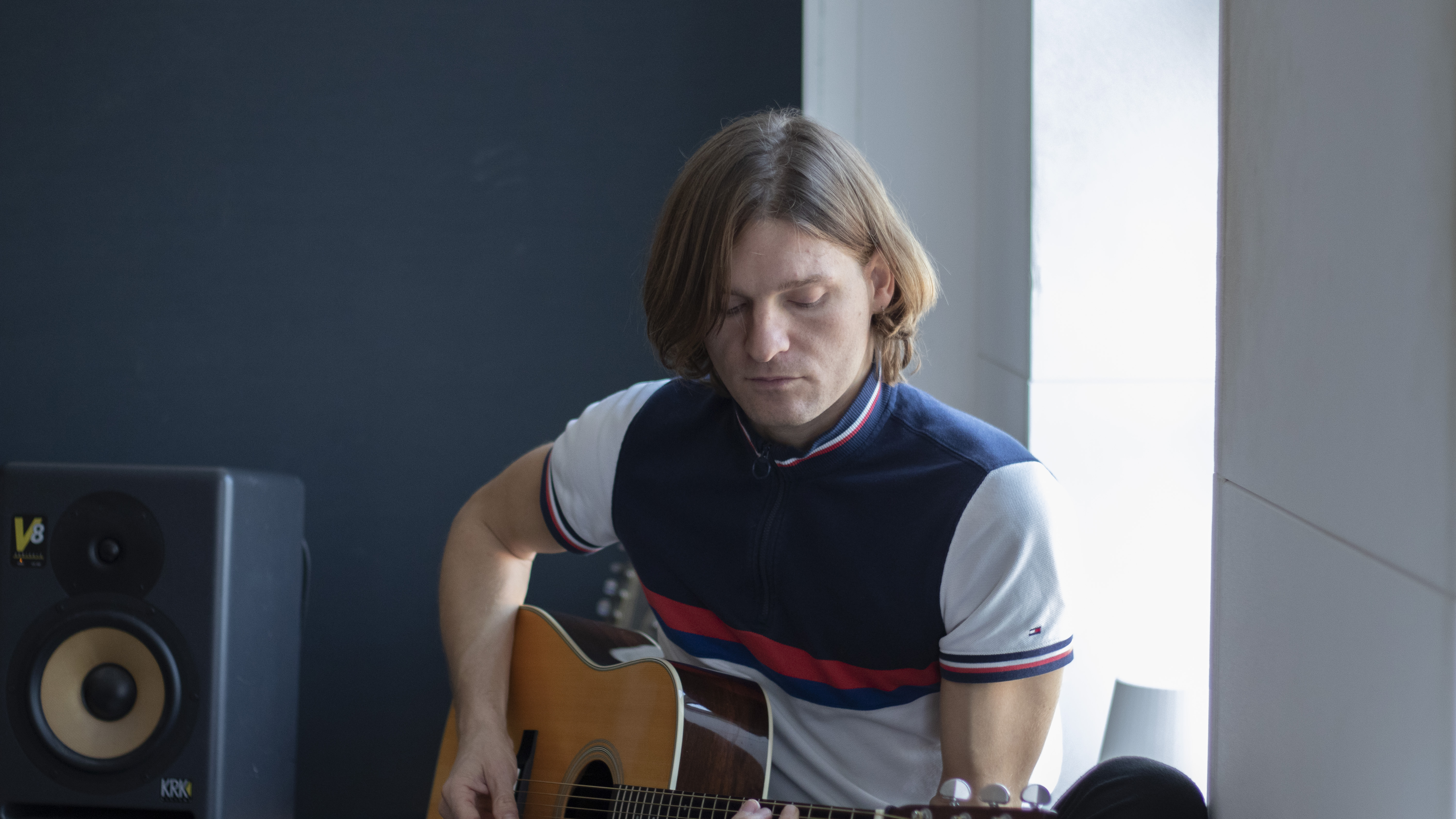 Johan Kolstrup i 2019